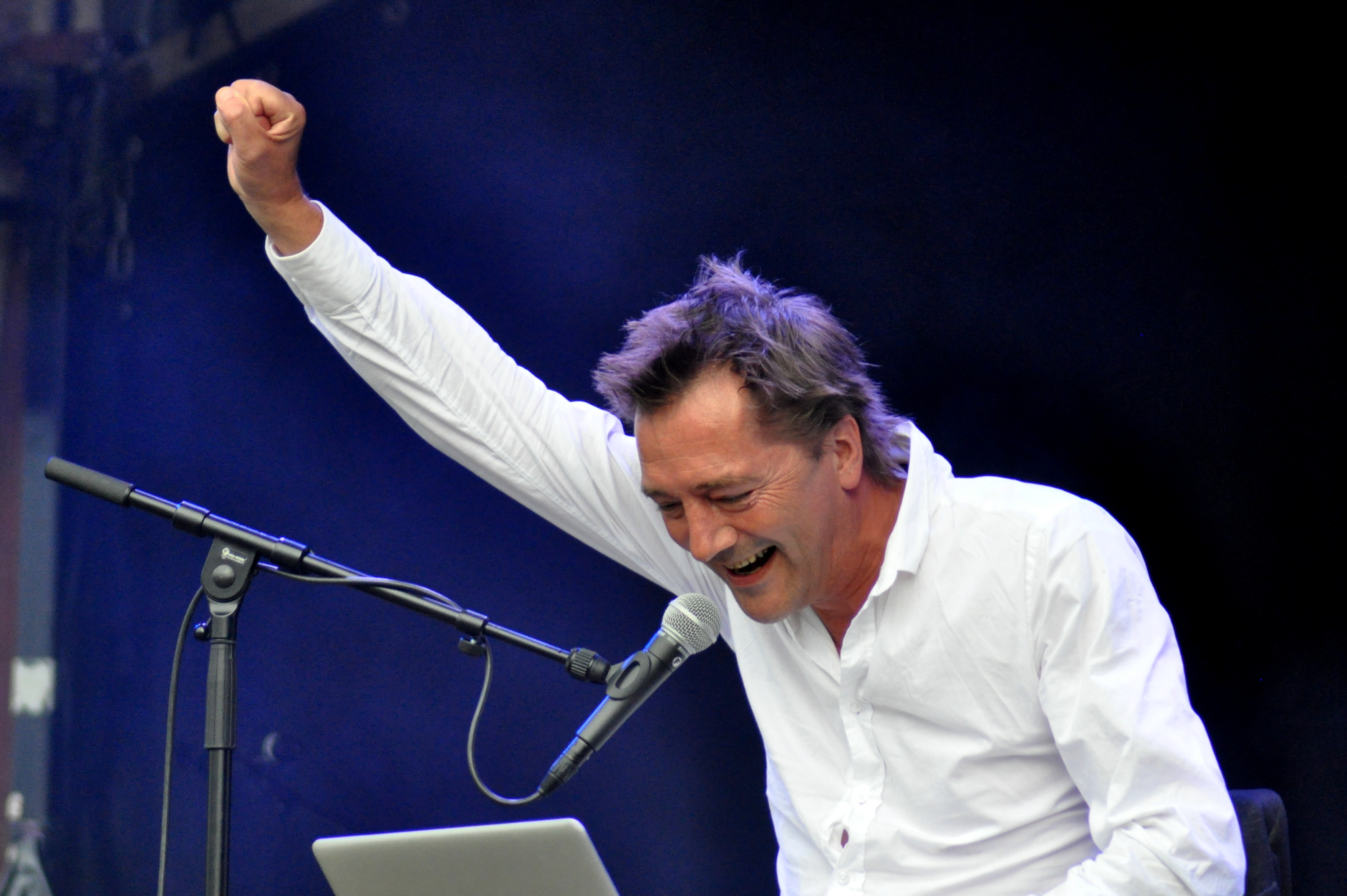 André Manuel aan het woord